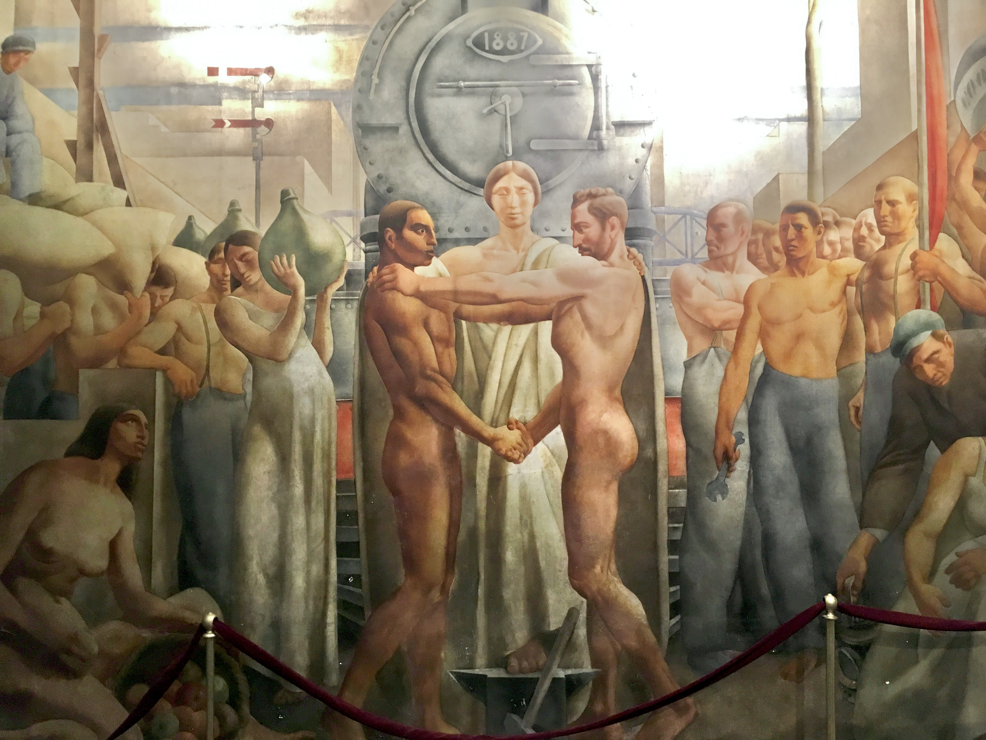 Mural en la entrada compartida del sindicato La Fraternidad y del Teatro Empire. Calle Hipólito Yrigoyen 1934 (Buenos Aires).